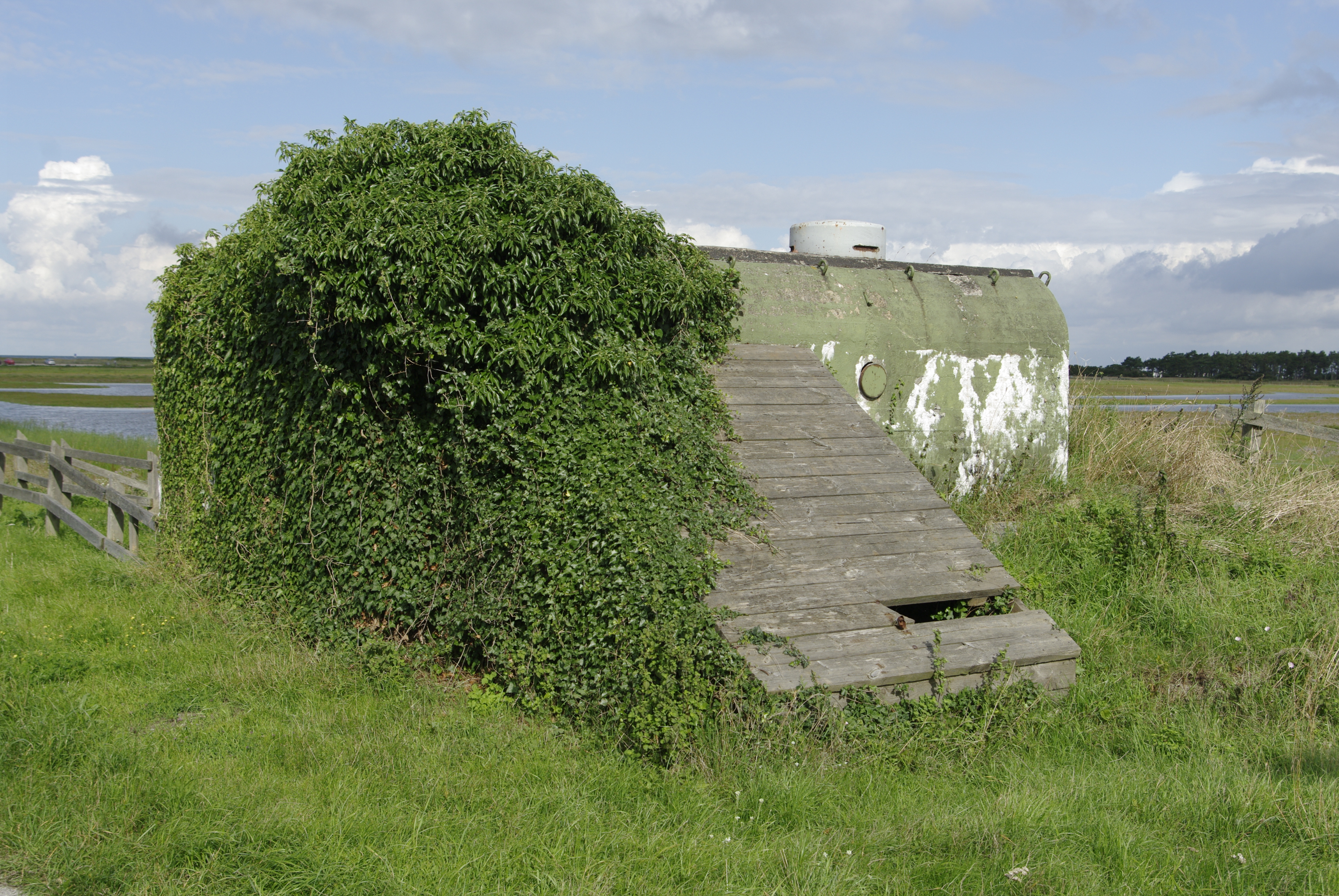 Bunker för försvar av Skanörs hamn